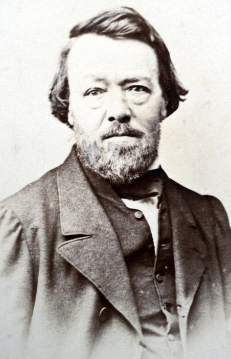 Auguste Borget